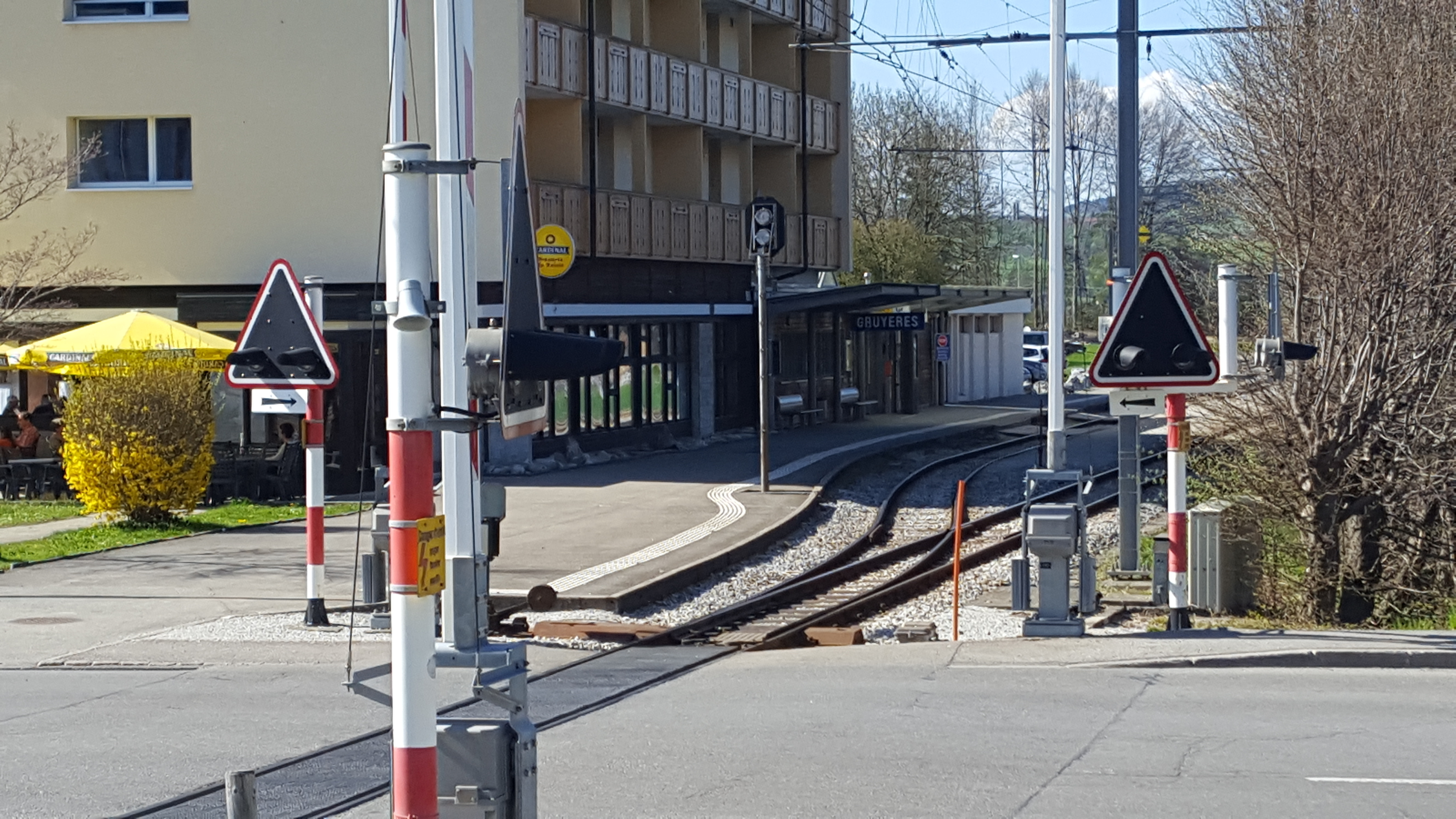 Der Bahnhof von Greyerz